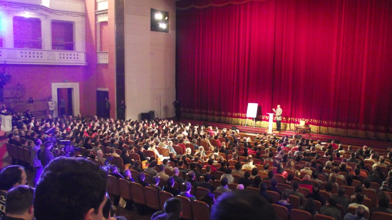 Движение «Суть времени» Съезд 5 марта 2012 года